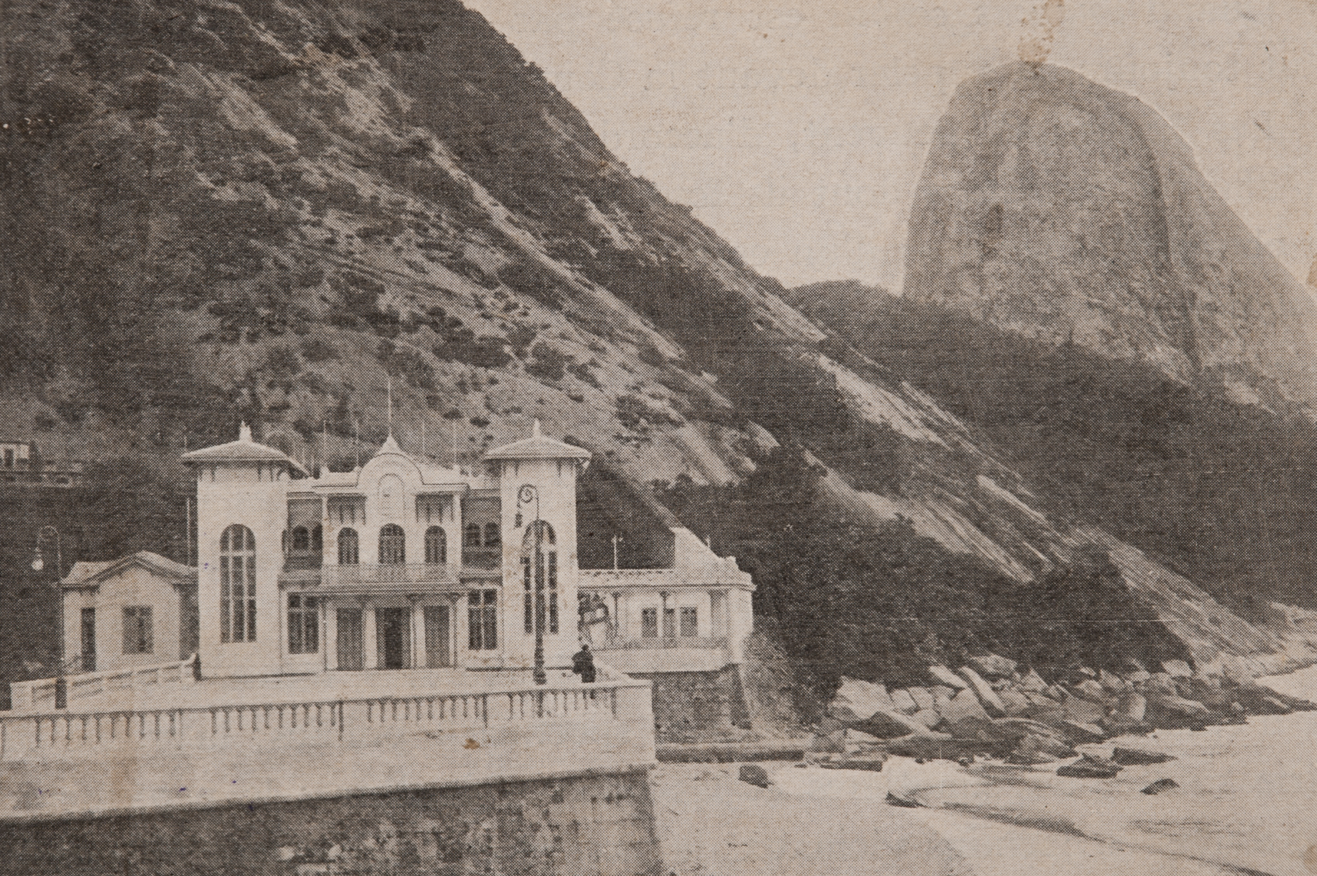 Obra que integra o acervo do Museu Paulista da USP. Coleção João Baptista de Campos Aguirra.